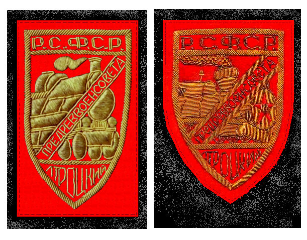 Шеврон стрелков бронепоезда Троцкого